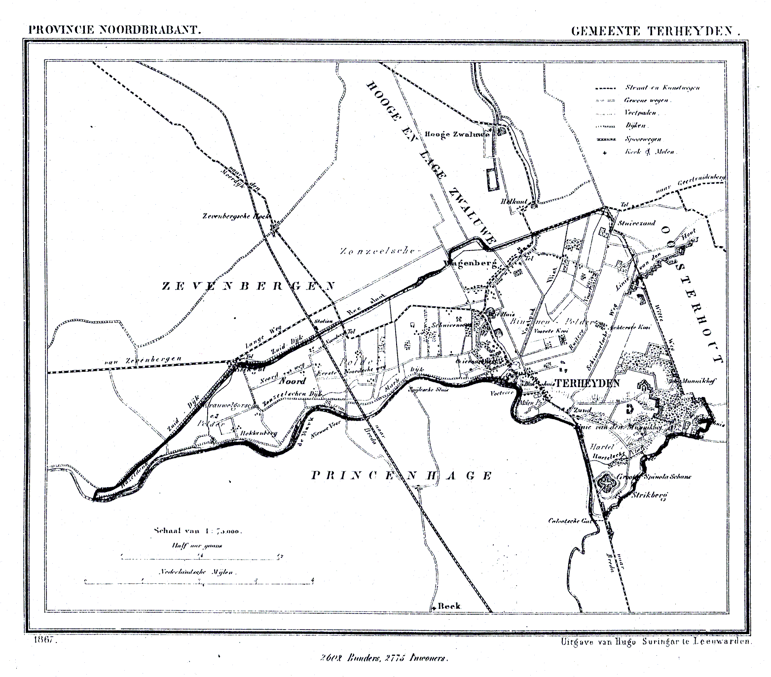 Nederland, Noord-Brabant, Gemeente Terheijden